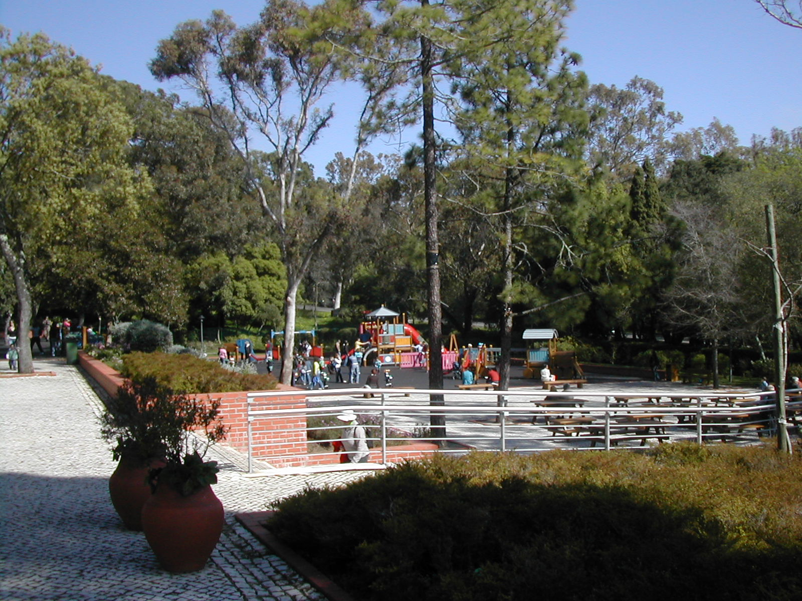 Parque do Alvito, Parque Florestal de Monsanto, Lisboa